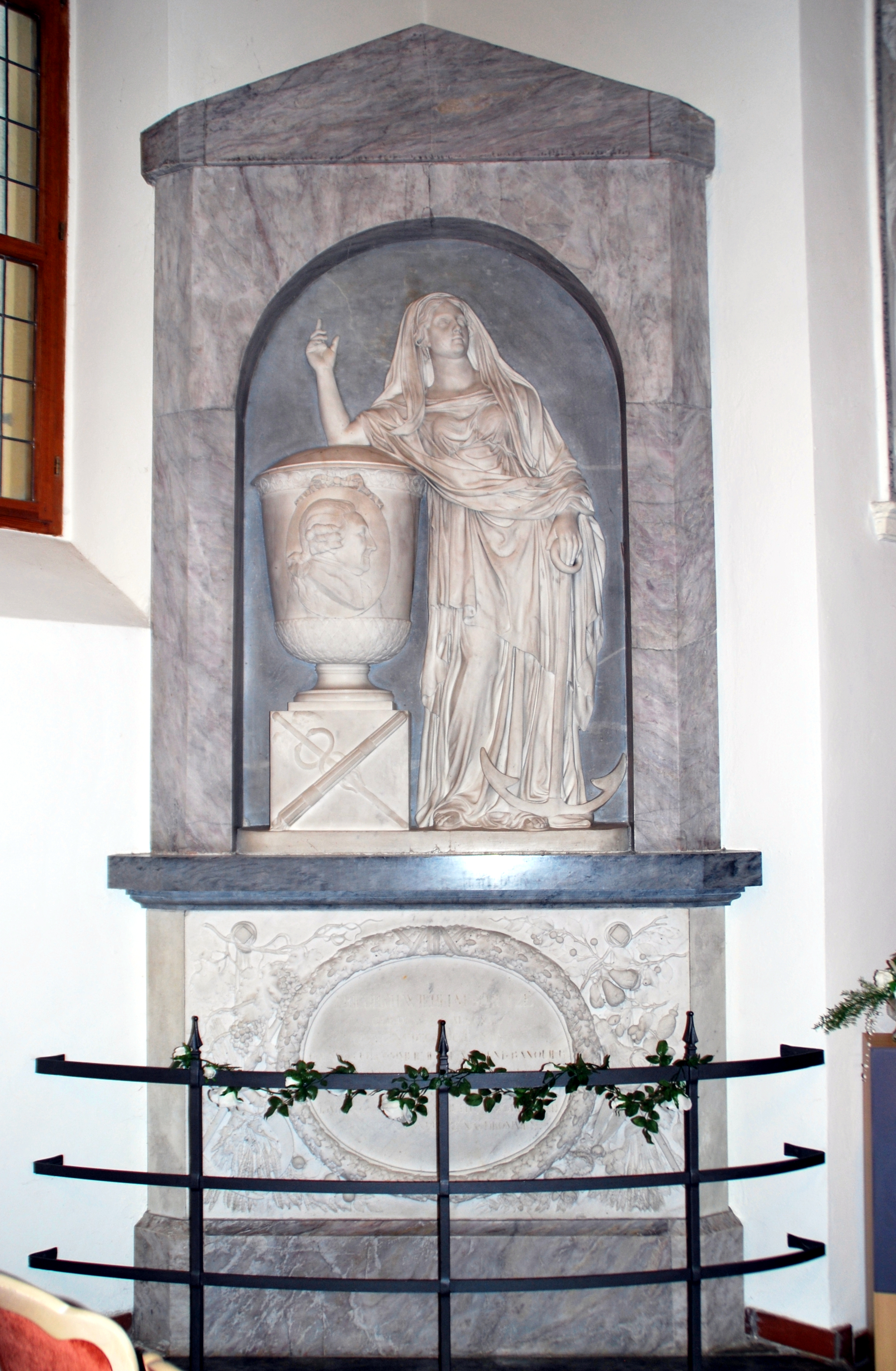 Von Johann Gottfried Schadow geschaffenes Marmor-Grabmal für Friedrich Wilhelm Schütze in der Schlosskirche Schöneiche